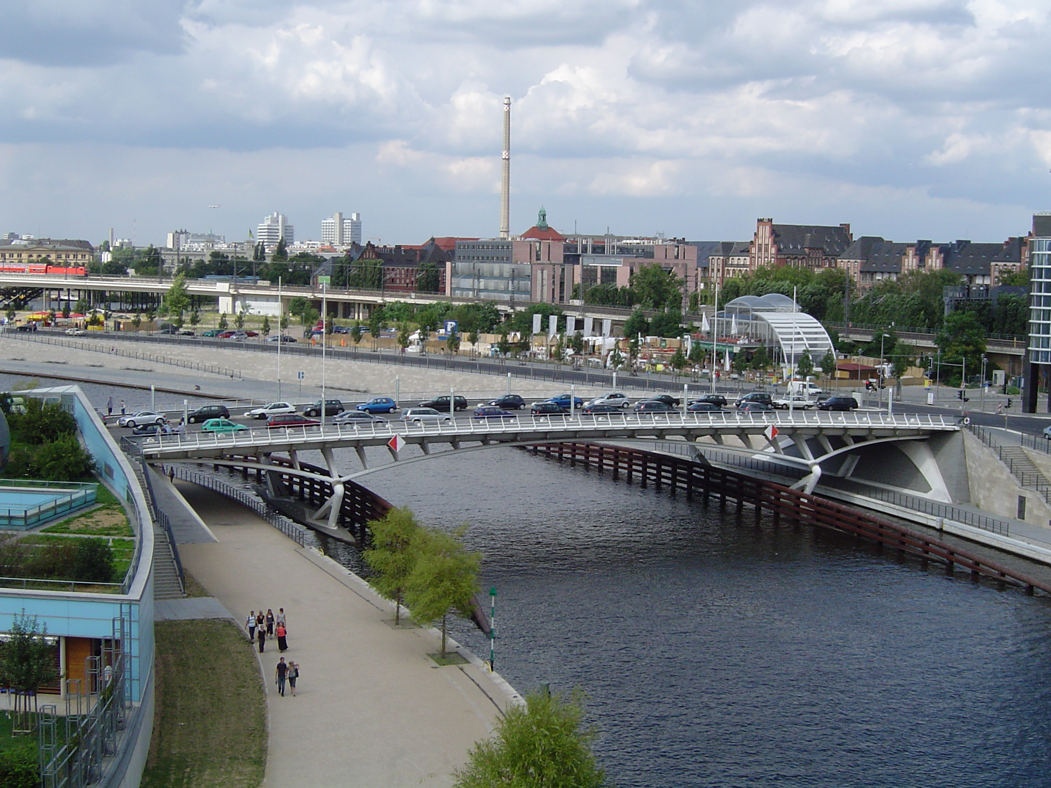 Kronprinzenbrücke in Berlin-Mitte